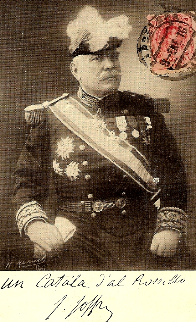 carte postale du Maréchal JOFFRE avec dédicace en catalan